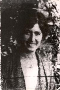 Foto di Amelia Pontremoli, dal CDEC (vedi link Amelia Pontremoli).